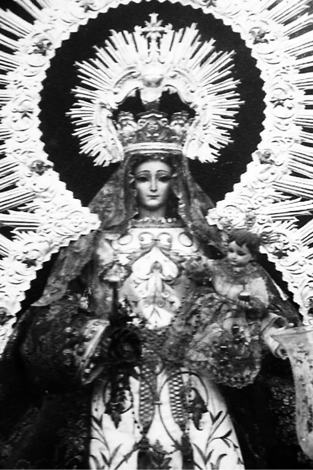 Nuestra Señora del Rosario de Bormujos ,foto antigua